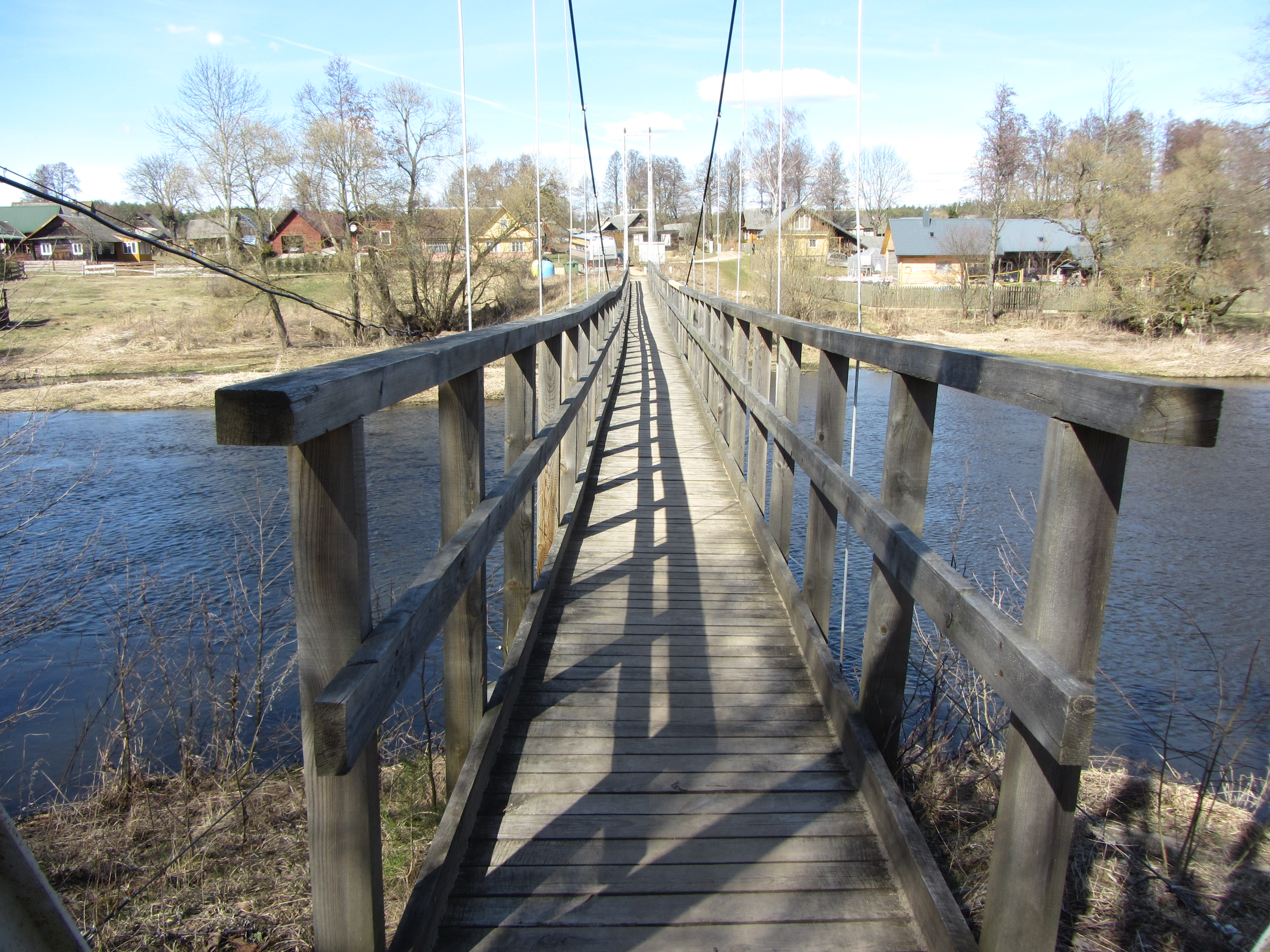 Pamerkiai 65430, Lithuania